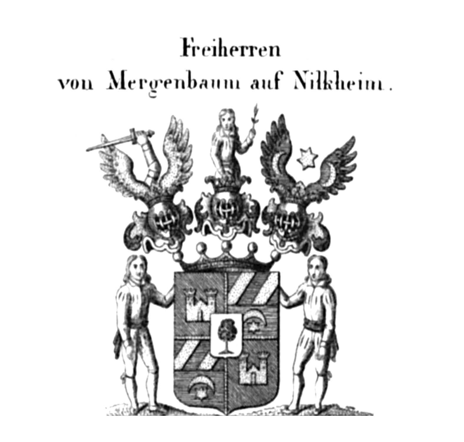 Wappen der Freiherrn Carl Constantin Victor von Mergenbaum